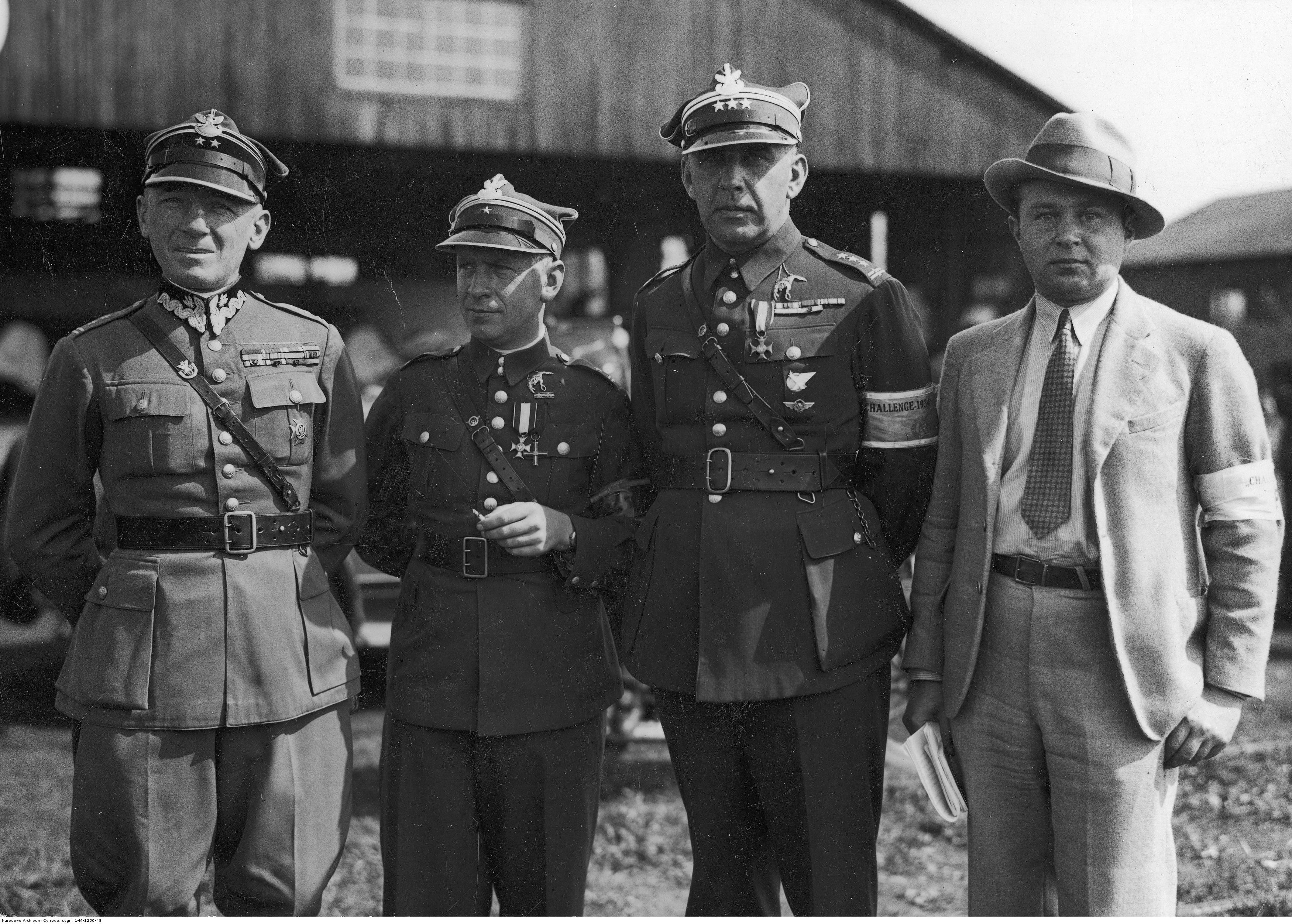 Międzynarodowe Zawody Samolotów Turystycznych (Challenge 1934) w Warszawie. Płk Kazimierz Glabisz, kpt. Stanisław Skarżyński, płk Władysław Kalkus i red. Władysław Mart (stoją od lewej) obserwują odlot samolotów. Koncern Ilustrowany Kurier Codzienny - Archiwum Ilustracji. Sygnatura: 1-M-1250-48